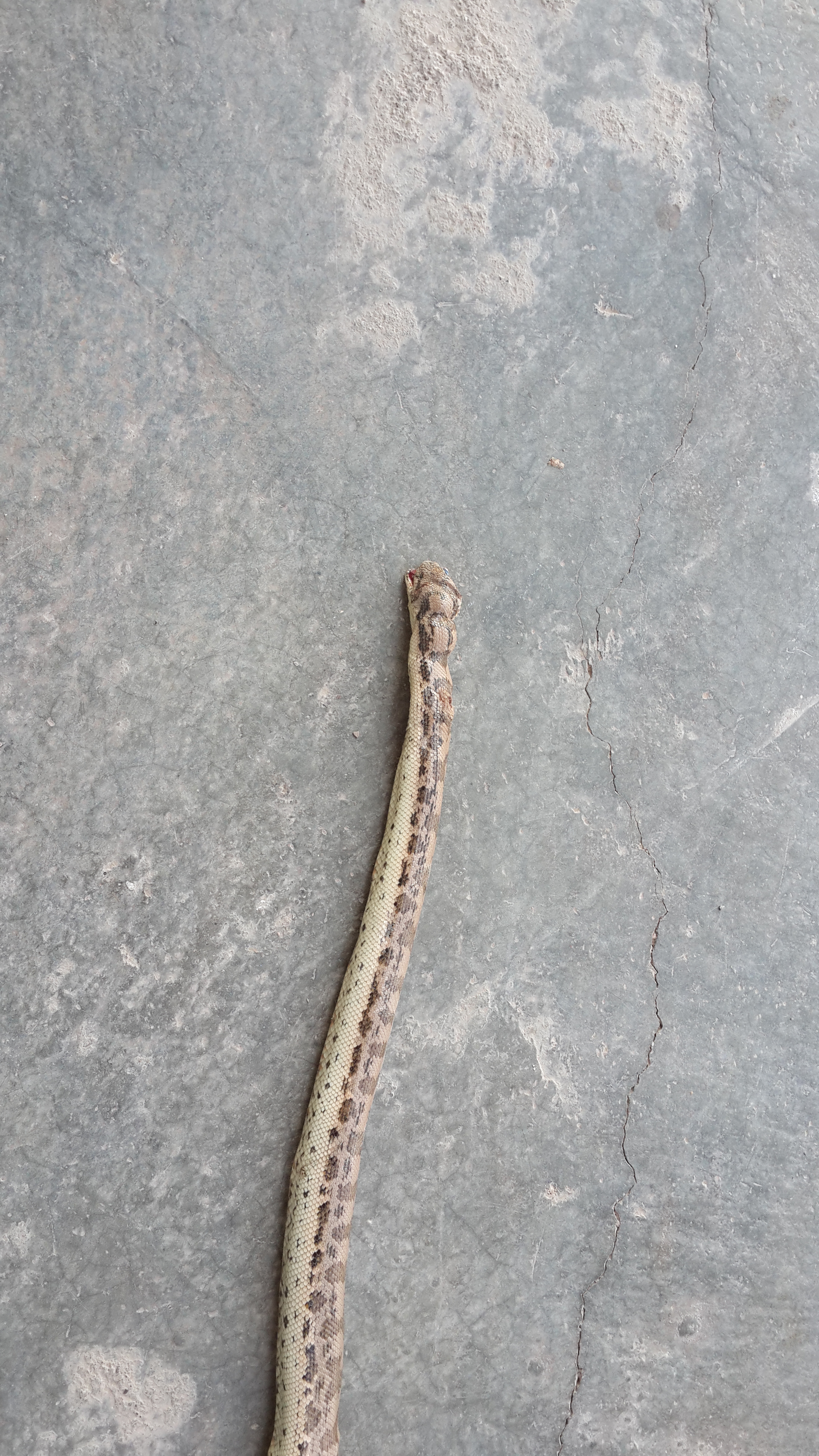 مار خاکی که با ضربه به سر کشته شده است